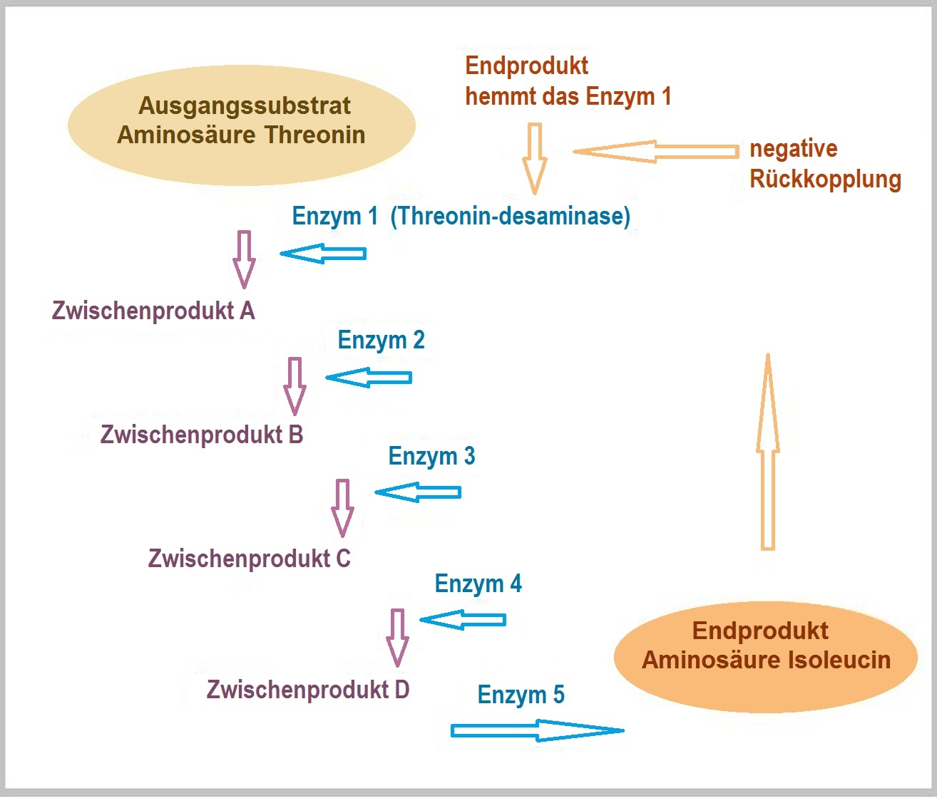 Regulation durch Feedback-Hemmung